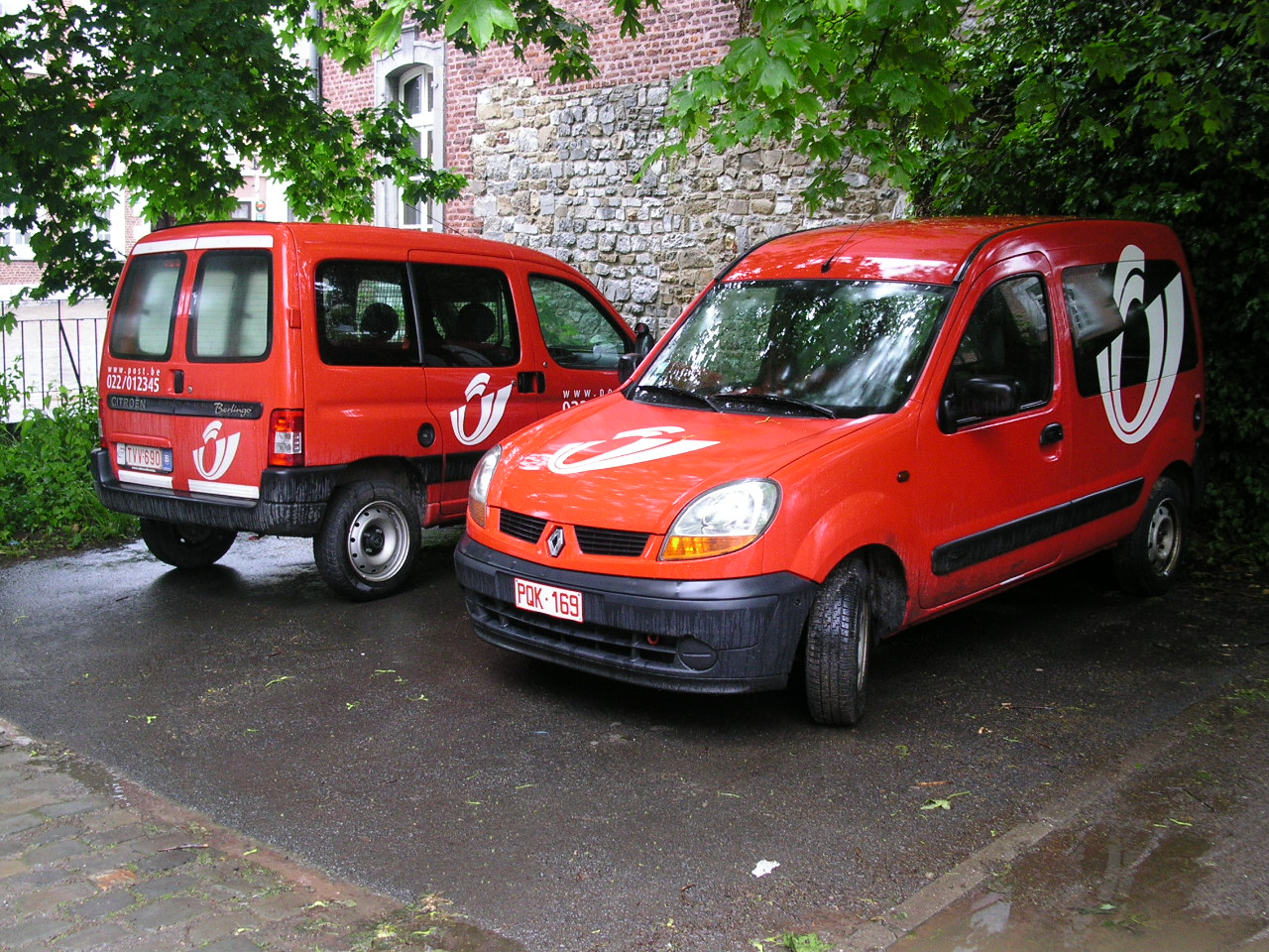 Bezorgauto's Belgische Post in Eupen